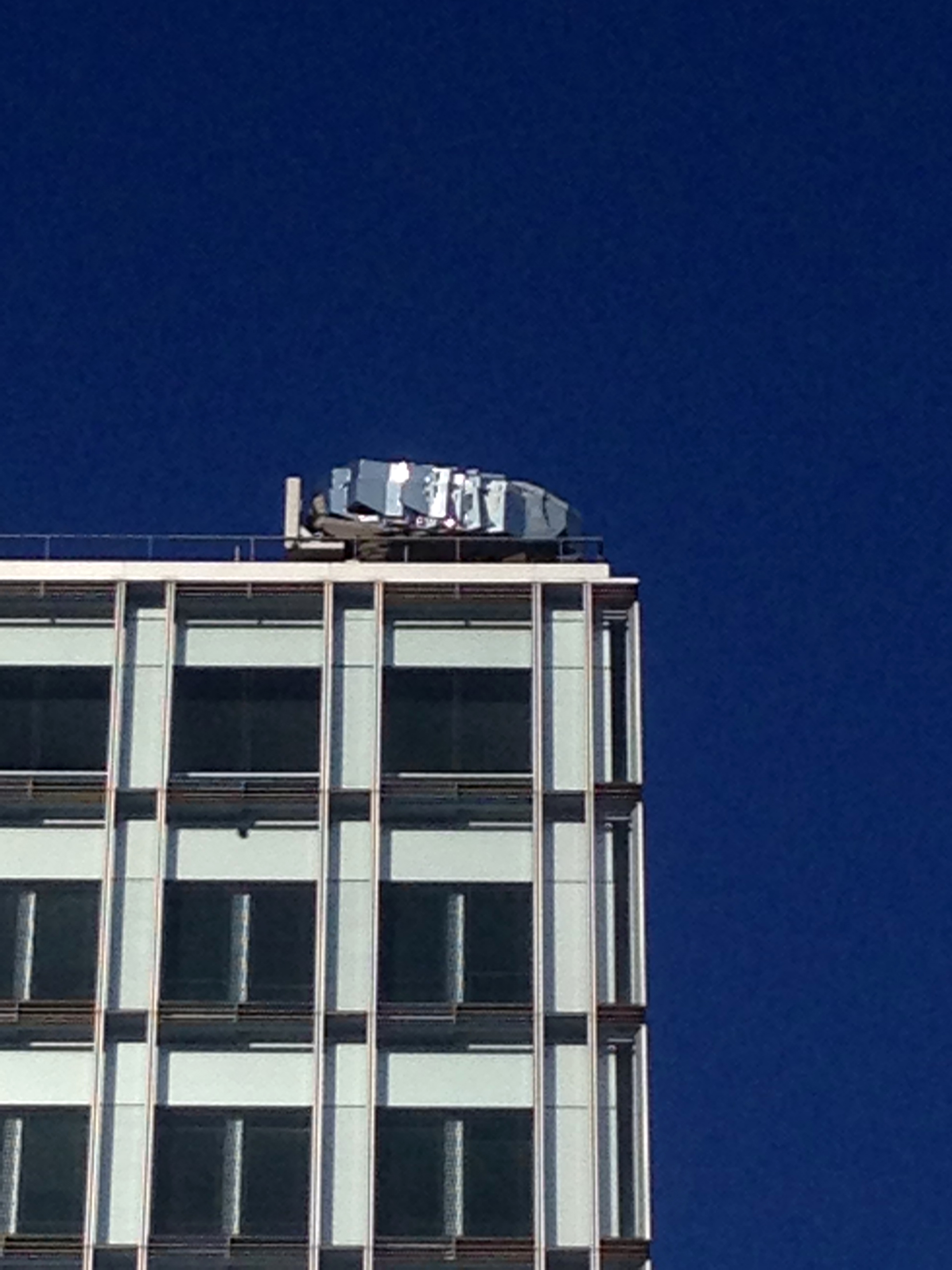 NRW.Bank mit „Crystal Rock“ von Ayşe Erkmen, Düsseldorf, Sicht von Reichsstraße